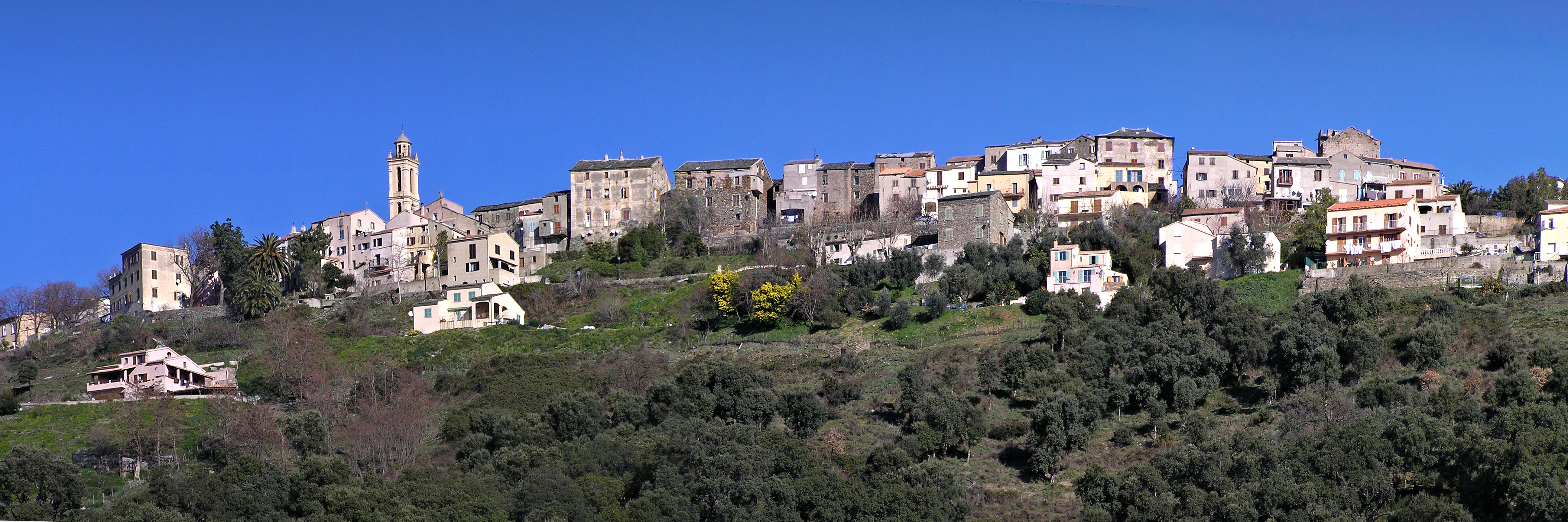 Borgo (Corse) - Panorama du village